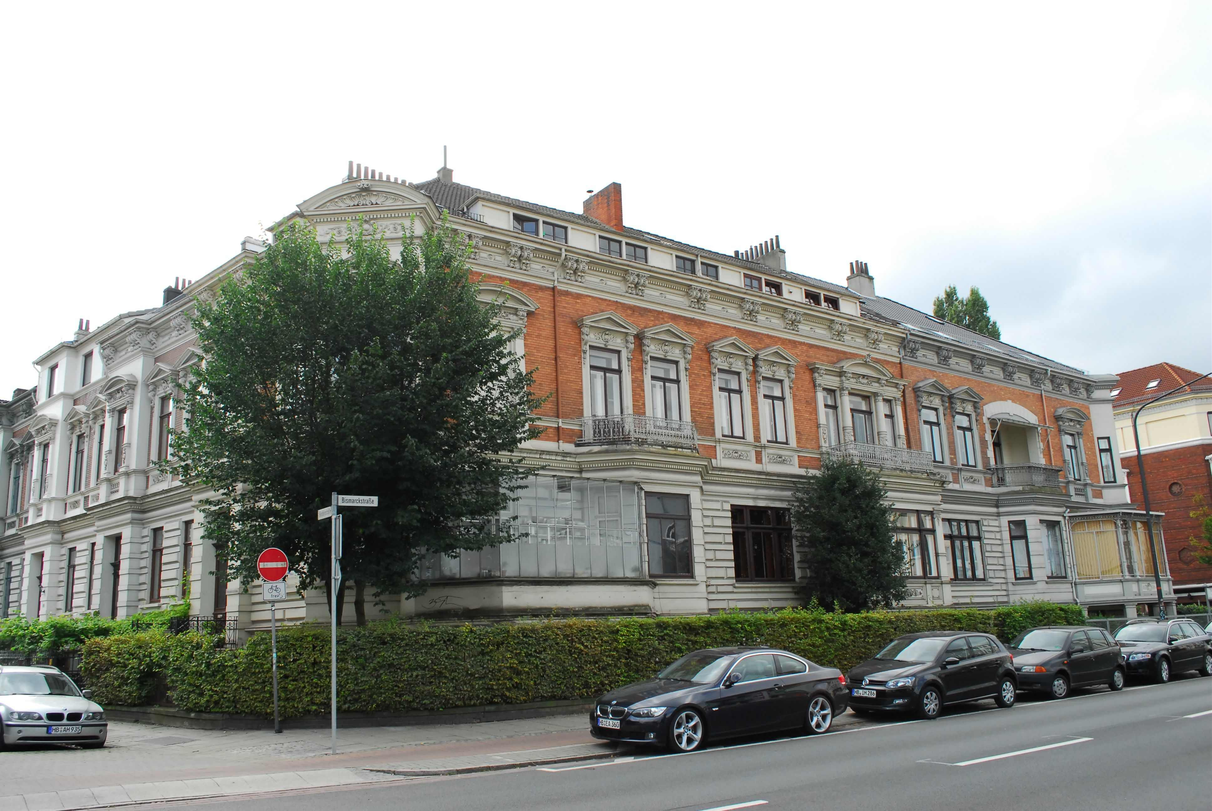 Wohnhaus in Bremen, Herderstraße 92 / Bismarckstraße.Das abgebildete Objekt ist ein geschütztes Kulturdenkmal in der Freien Hansestadt Bremen, mit der Nr. 0552 beim Landesamt für Denkmalpflege registriert.